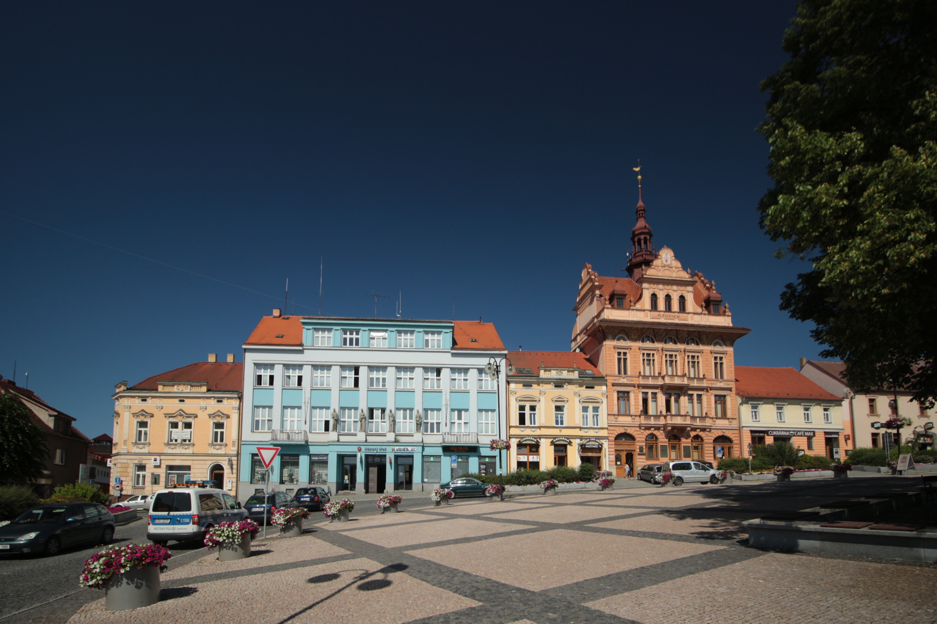 Sedlčany náměstí TGM